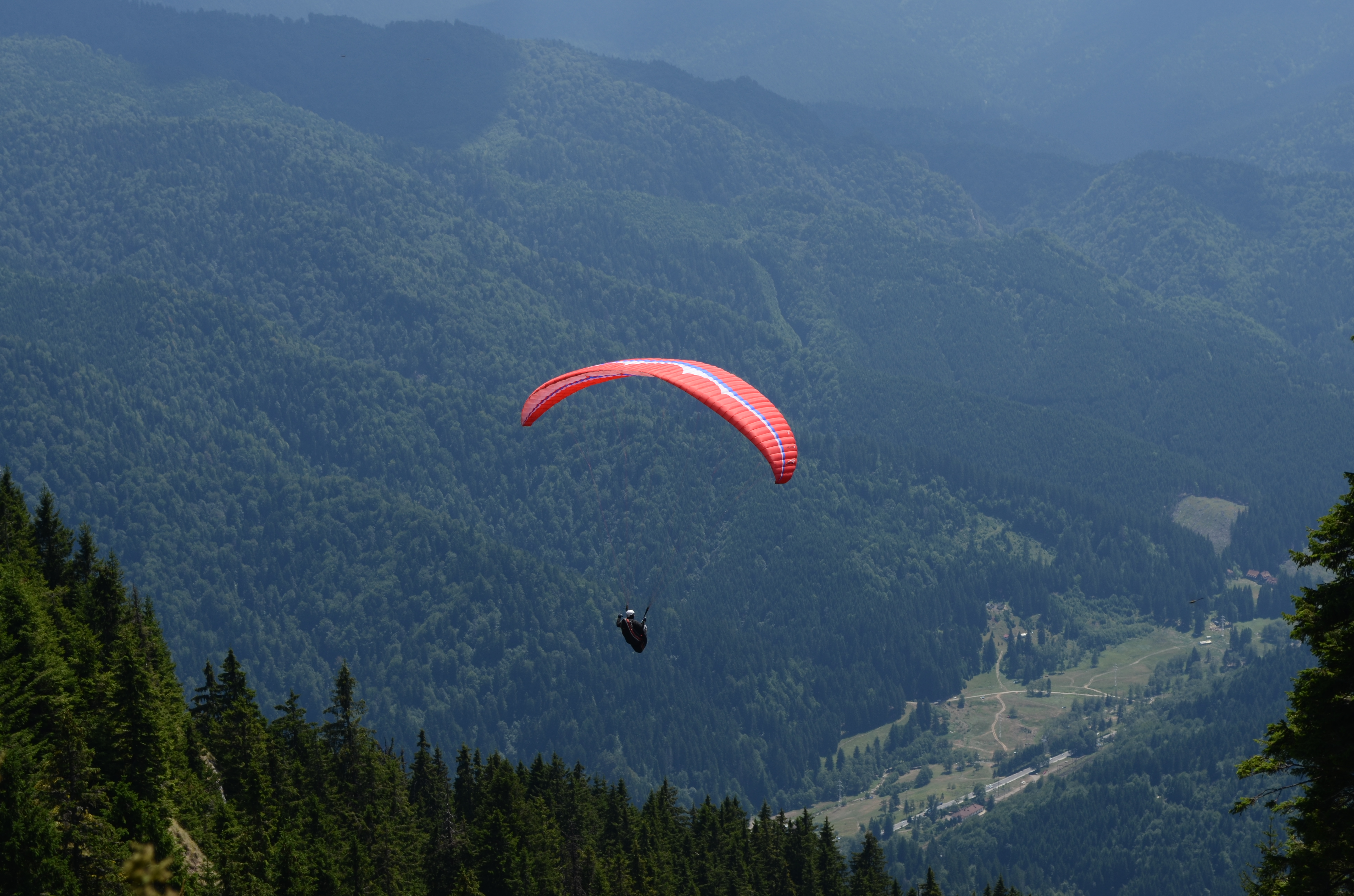 Српски (ћирилица): Параглајдер полеће са врха Поставарул